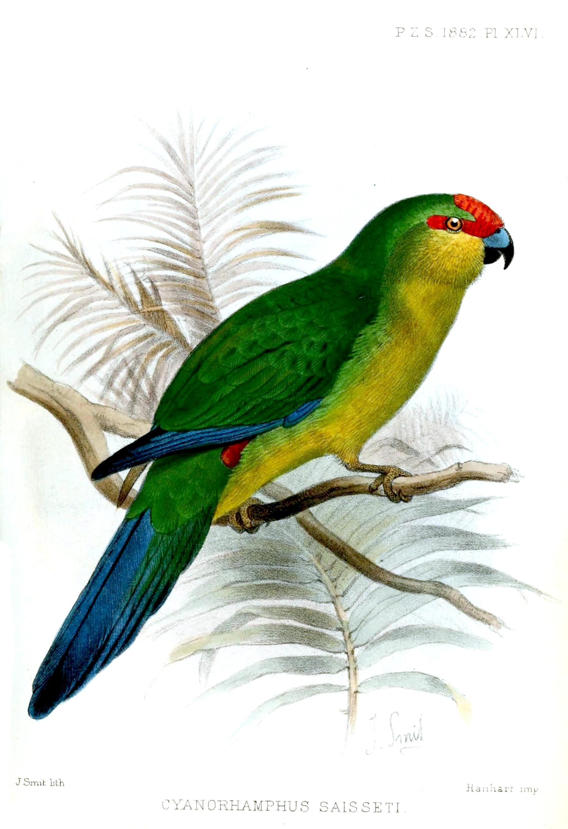 Cyanoramphus saisseti